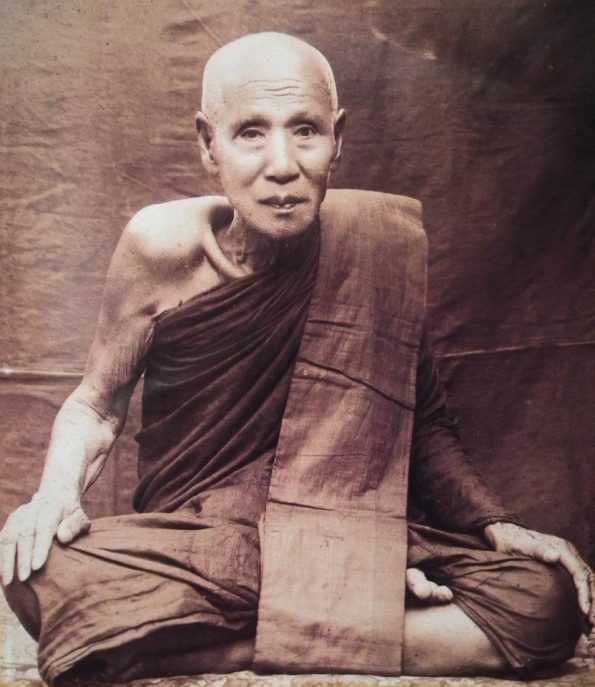 พระอาจารย์เสาร์ กนฺตสีโล